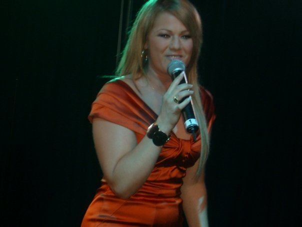 Maria Haukaas Storeng. Photo taken at Scala nightclub, London.